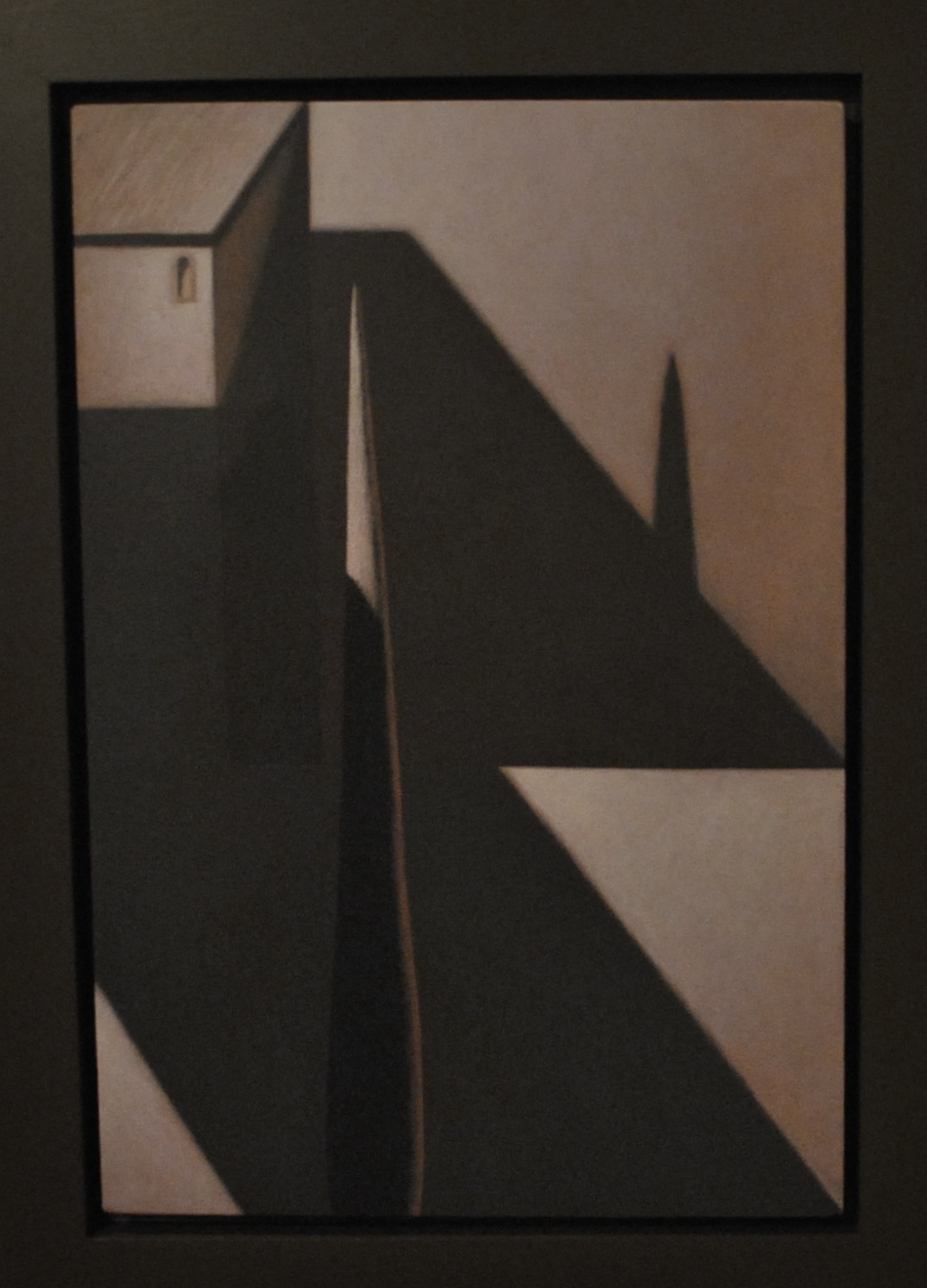 Enrico Lombardi, Esercizi Spirituali 13, acrilico su tela, cm 60x40, 2013